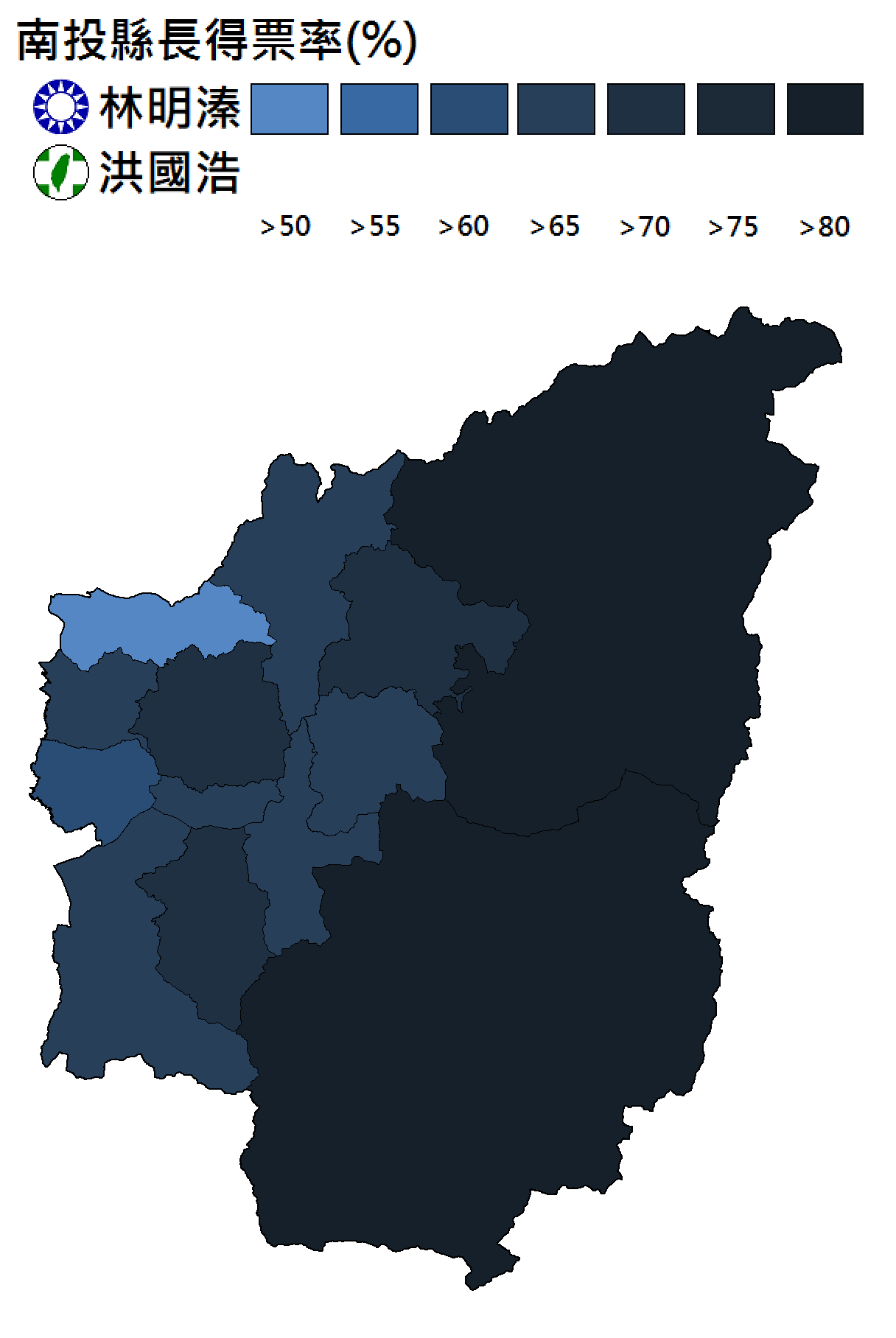 中文（台灣）: 南投縣長選舉得票分布。